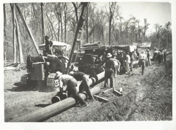 Es una foto de la construcción del gasoducto Campo Durán, construido durante la "batalla del petróleo".